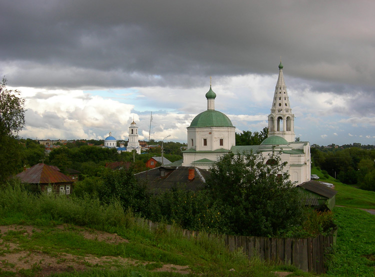 Троицкий собор города Серпухова Троицкий собор города Серпухова. Вид с места бывшей Караульной башни Серпуховского кремля. Вдали виден кафедральный собор «Никола Белый».